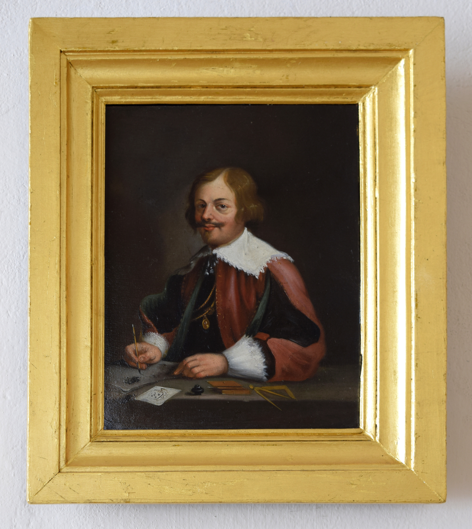 Portrait Jacques Callot, Schlafgemach des Kurfürsten, Schloss Caputh. Gemälde eines unbekannten Malers nach dem von Lucas Vorsterman gefertigten Kupferstich nach Anthonis van Dyck und für dessen Portraitwerk Icones principum, virorum doctorum. Cf.